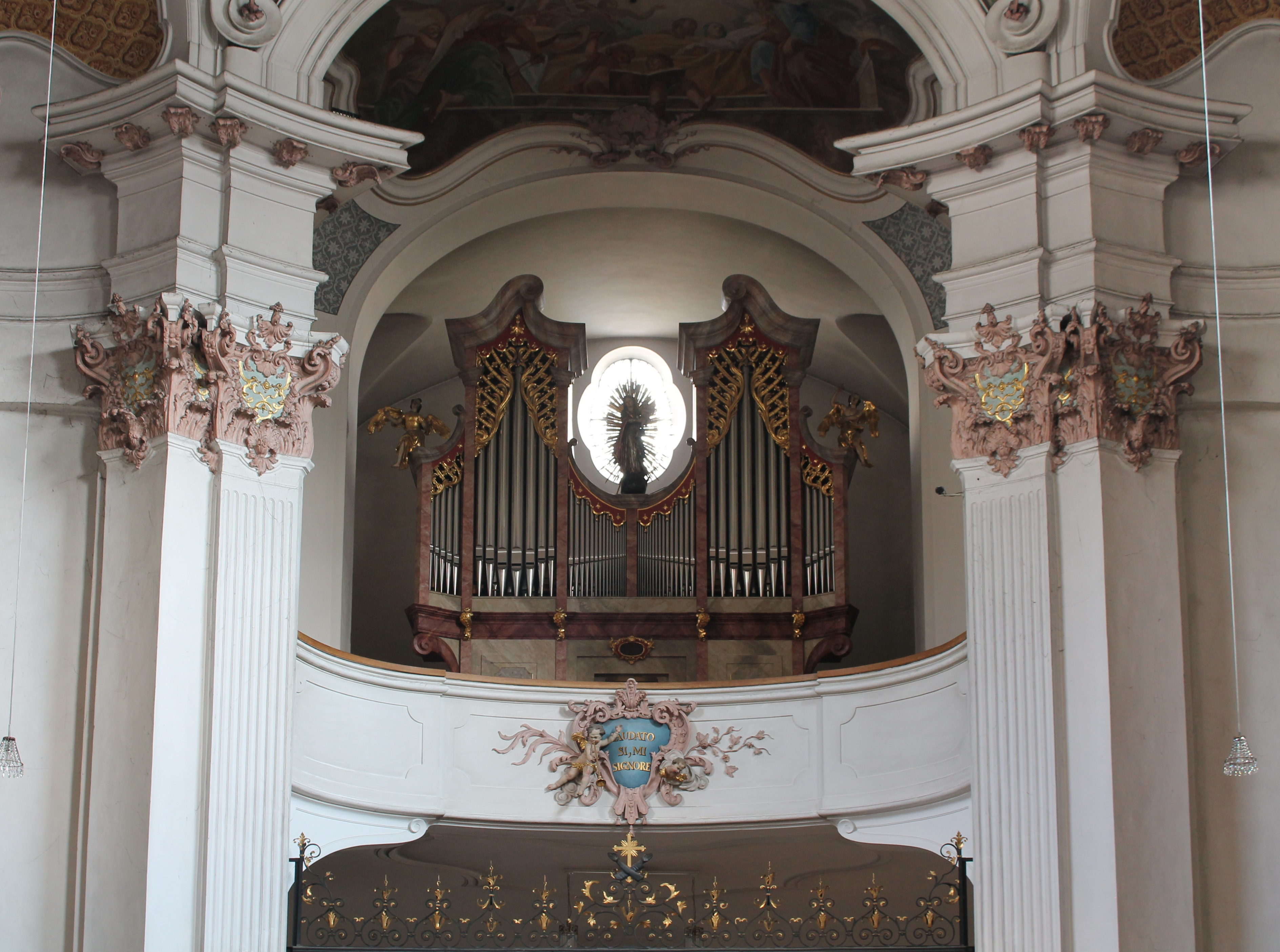 Orgel der Klosterkirche St. Anna im Lehel (1999, Mathis Orgelbau, II/23)